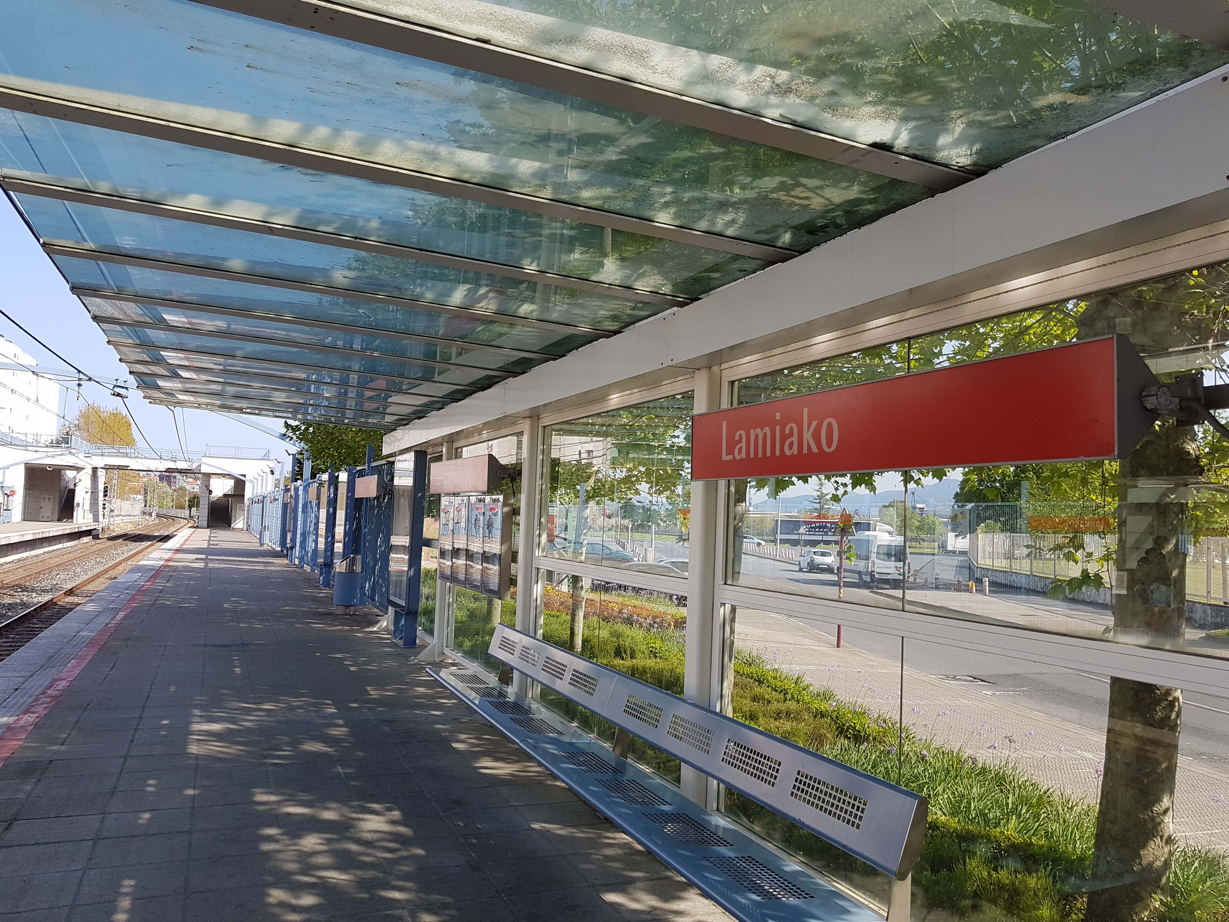 Estación de Lamiako.